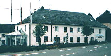 Geburtshaus von Nicolaus August Otto im August 2003 Im Erdgeschoß befindet sich ein Museum und in der ersten Etage die Gemeindeverwaltung der Gemeinde Holzhausen an der Haide